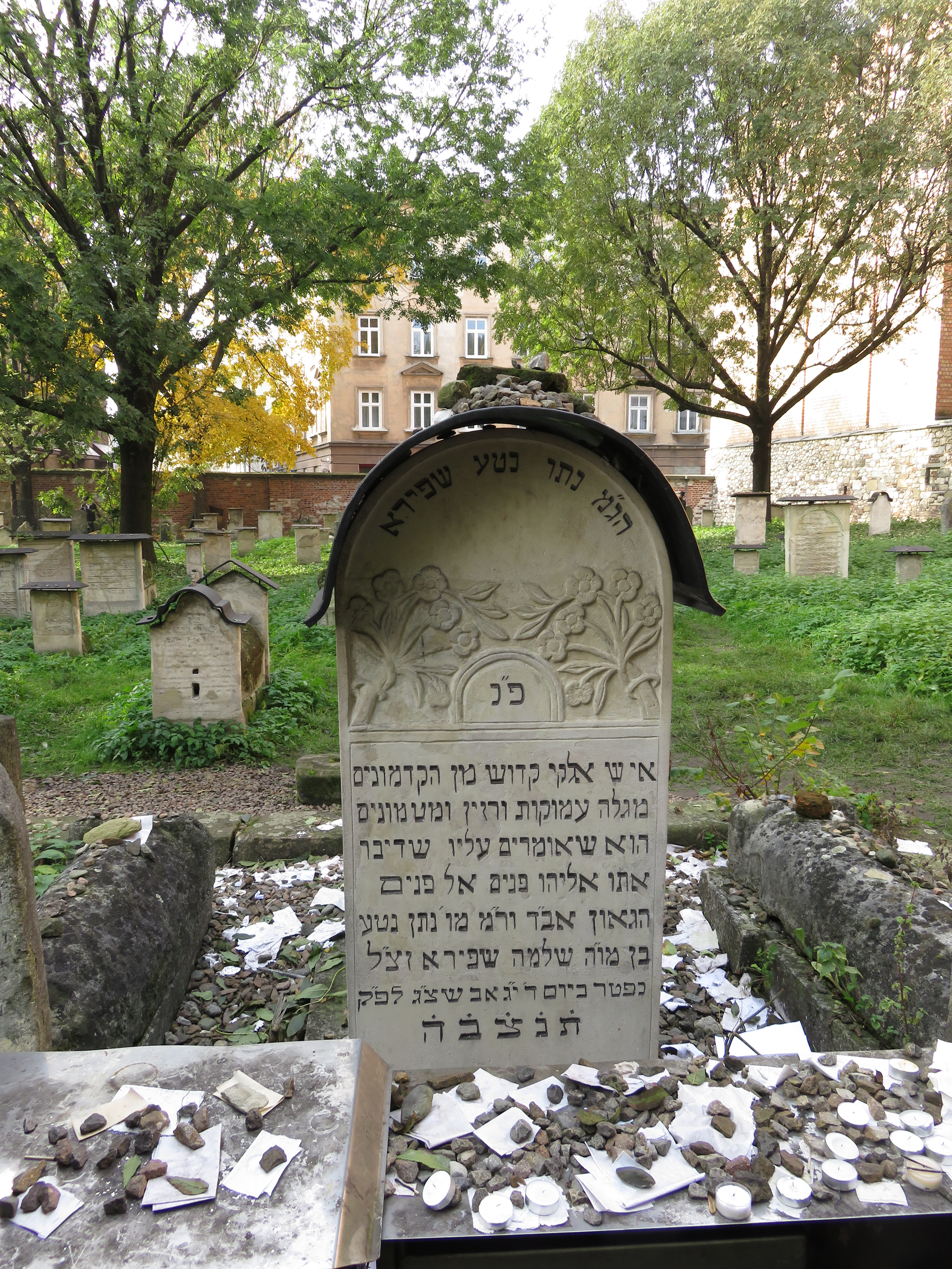 מצבת רבי נתן נטע שפירא. בית הקברות היהודי העתיק בקרקוב (3).jpg